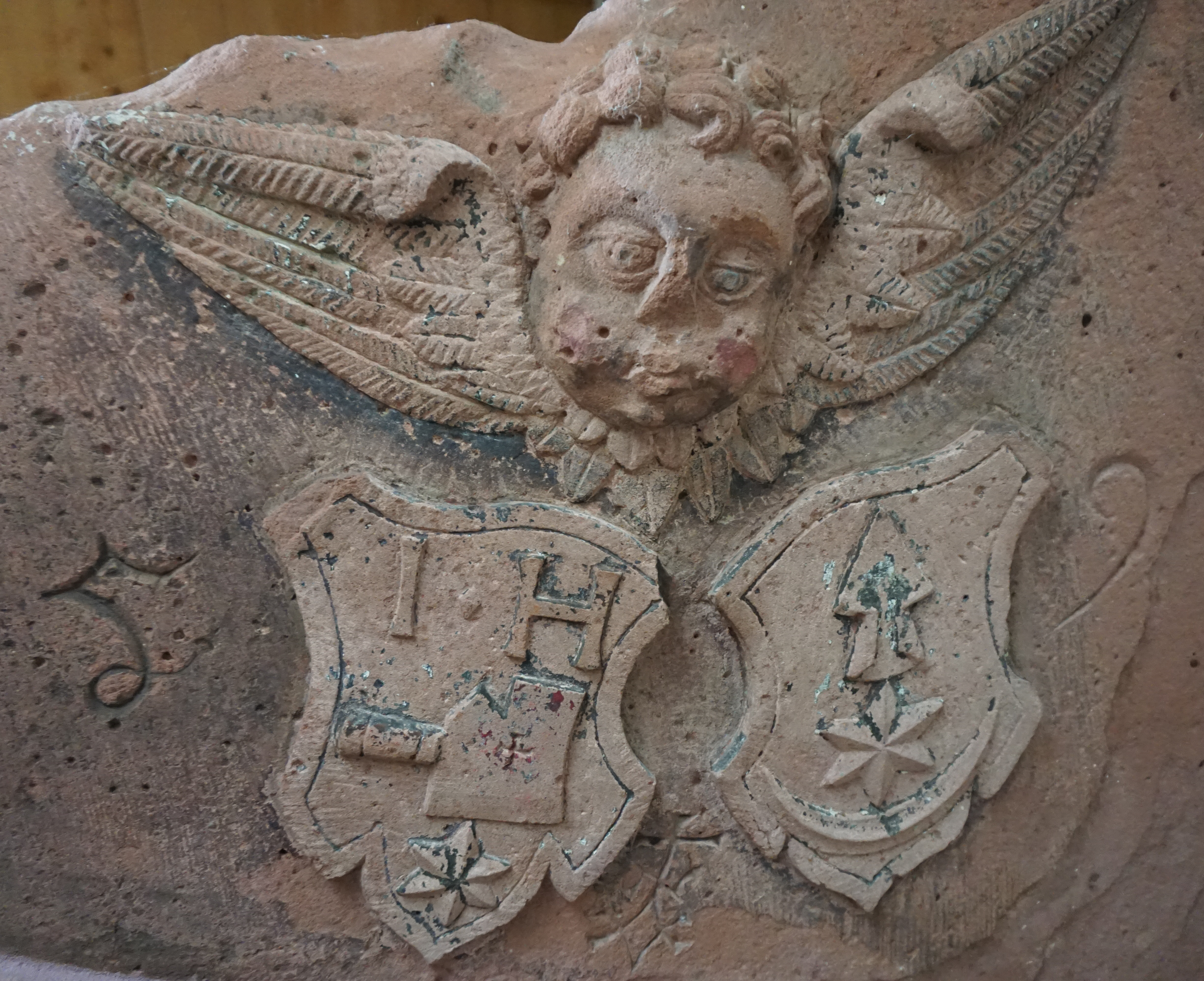 Allianzwappen der Familie Haller in der Spindeltreppe des Vogtshauses in Steinen